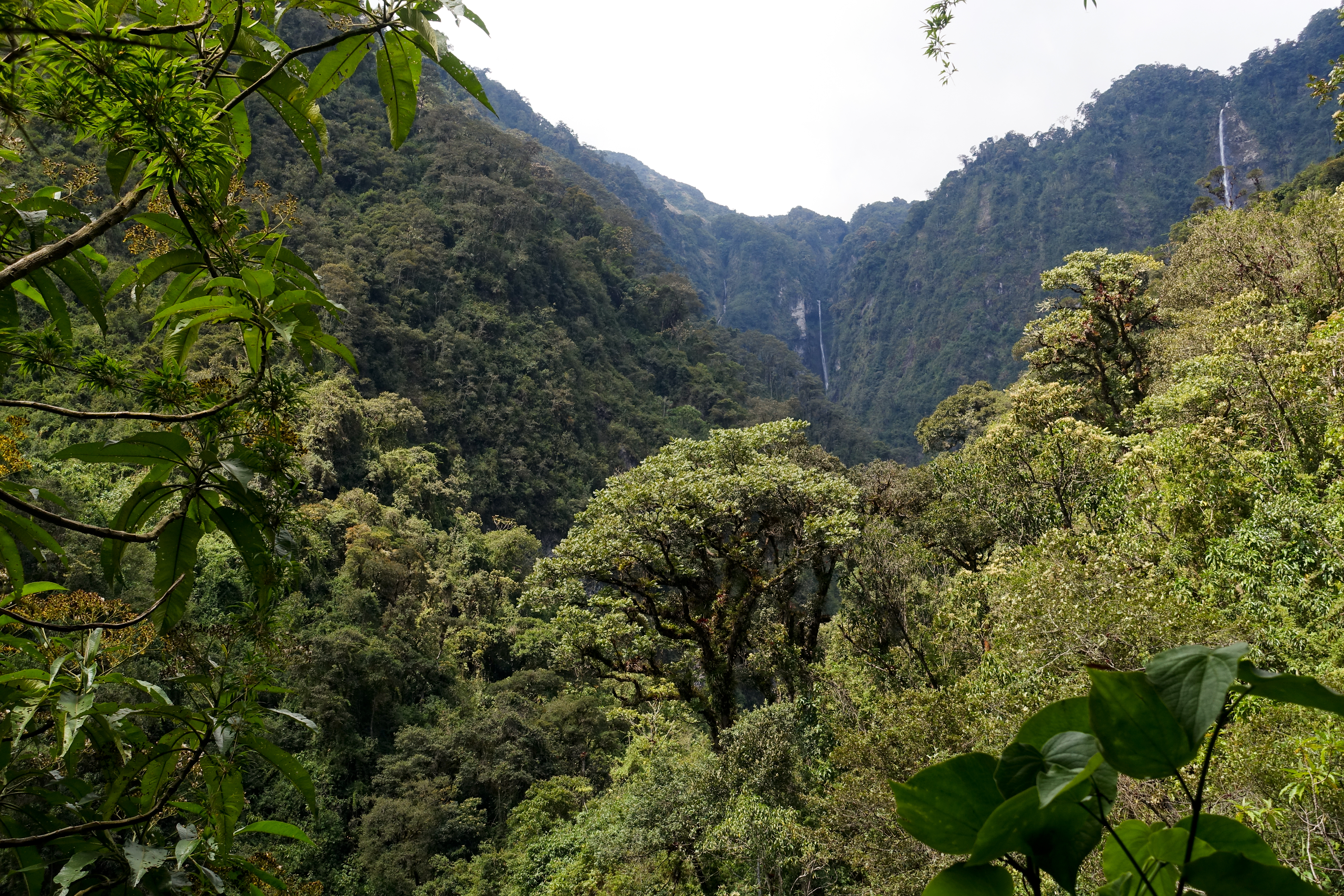 Huandisagua-Kamm am Vulkan Tungurahua, Grenze des Sangay-Nationalparks